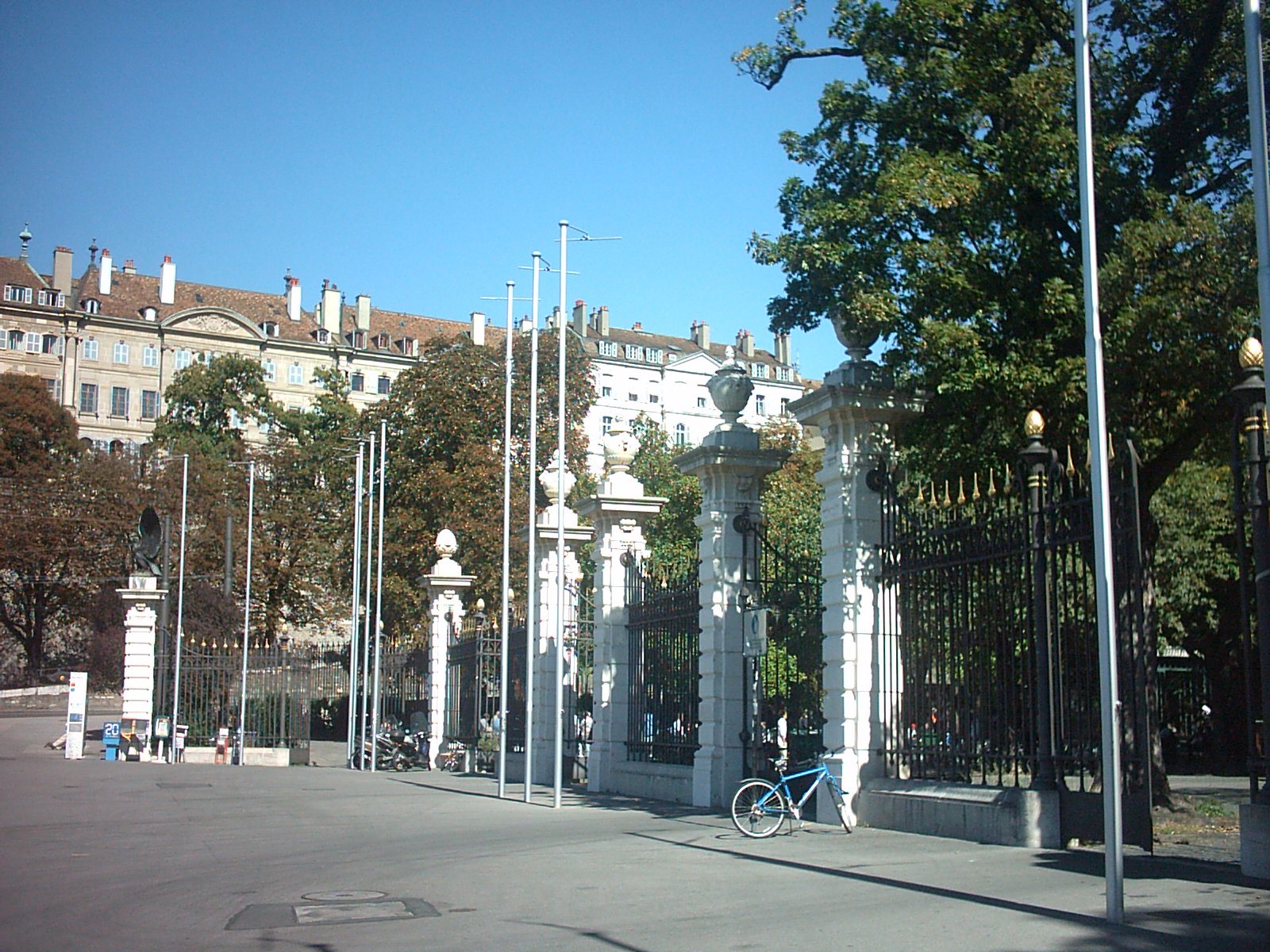 Entrée du parc des Bastions à Genève (Suisse)